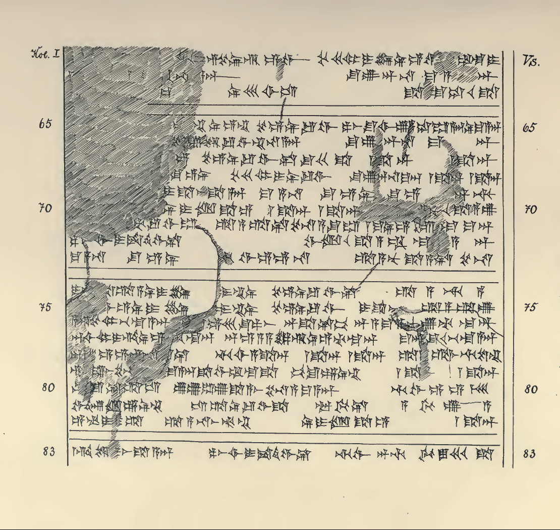 List Tuszratty do Amenhotepa III w języku huryckim – autografia.